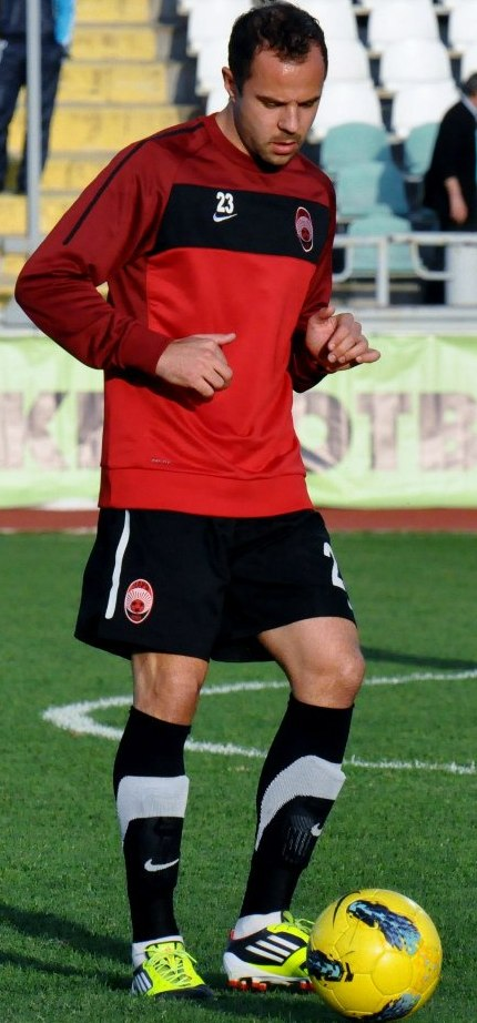 Иван Родич